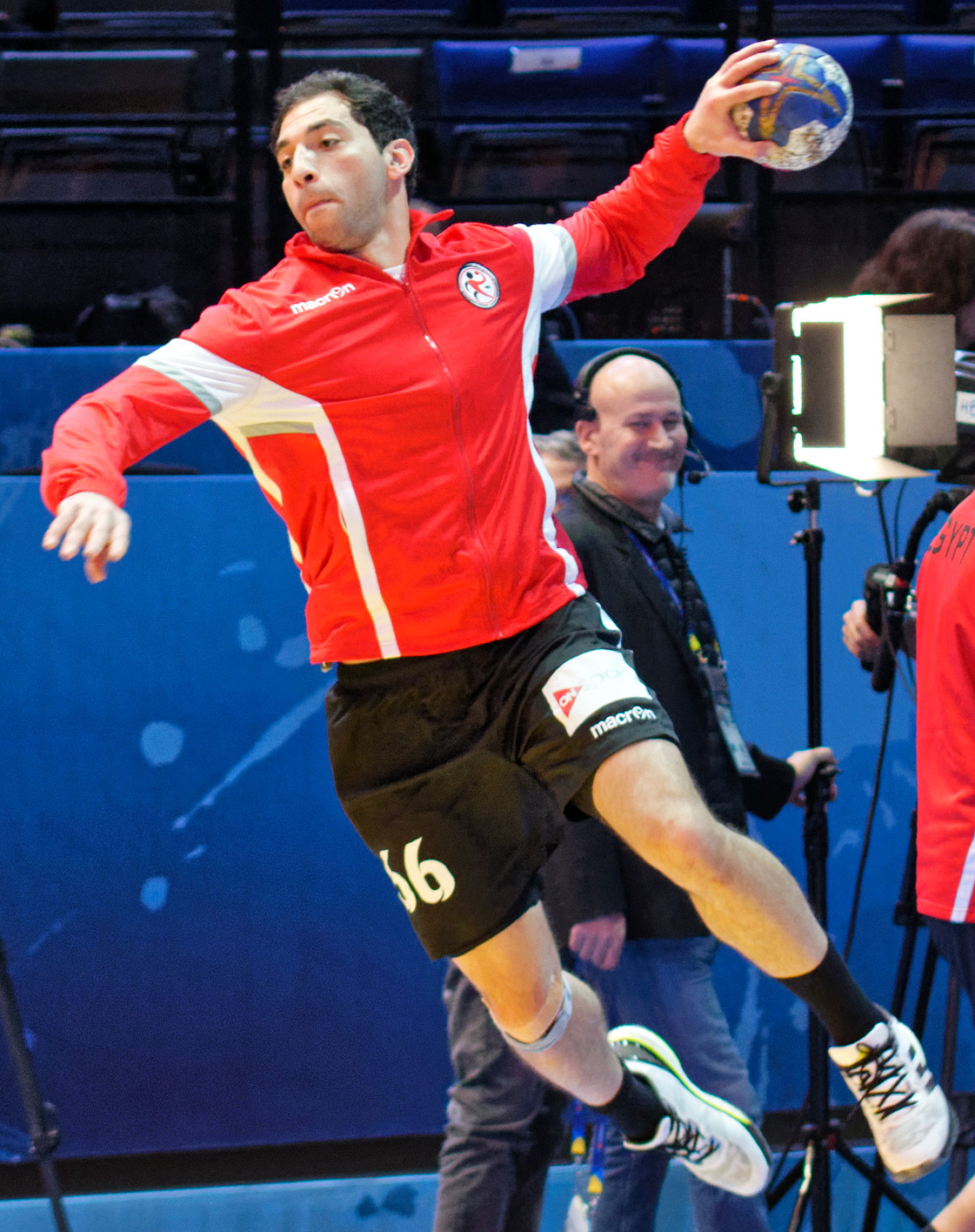 Match de la phase préliminaire du championnat du monde masculin de handball 2017 entre l'Egypte et le Danemark (Groupe D). A Bercy, le 14 janvier 2017.